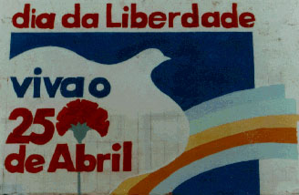 fotografia de mural de 1975